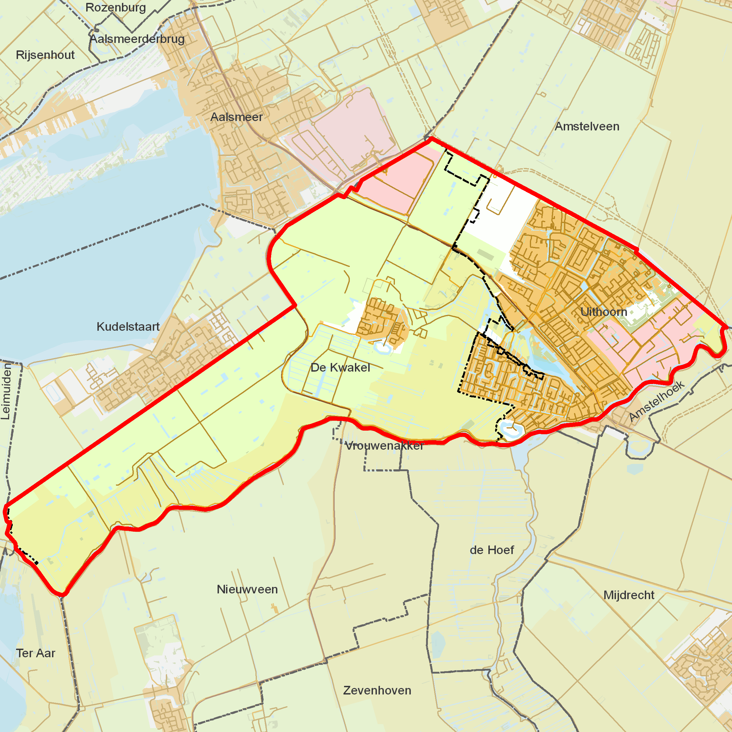 BAG woonplaatsen - Gemeente Uithoorn.png